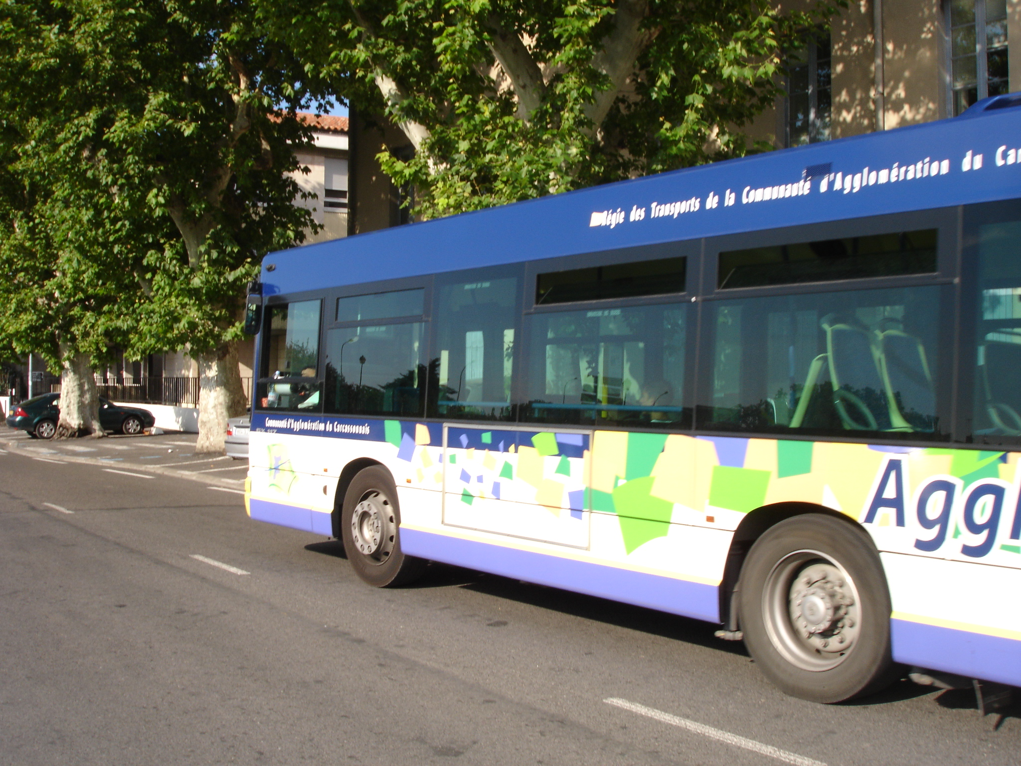 France, Aude (11), Carcassonne, Agglobus de la ville. Heuliez GX117.